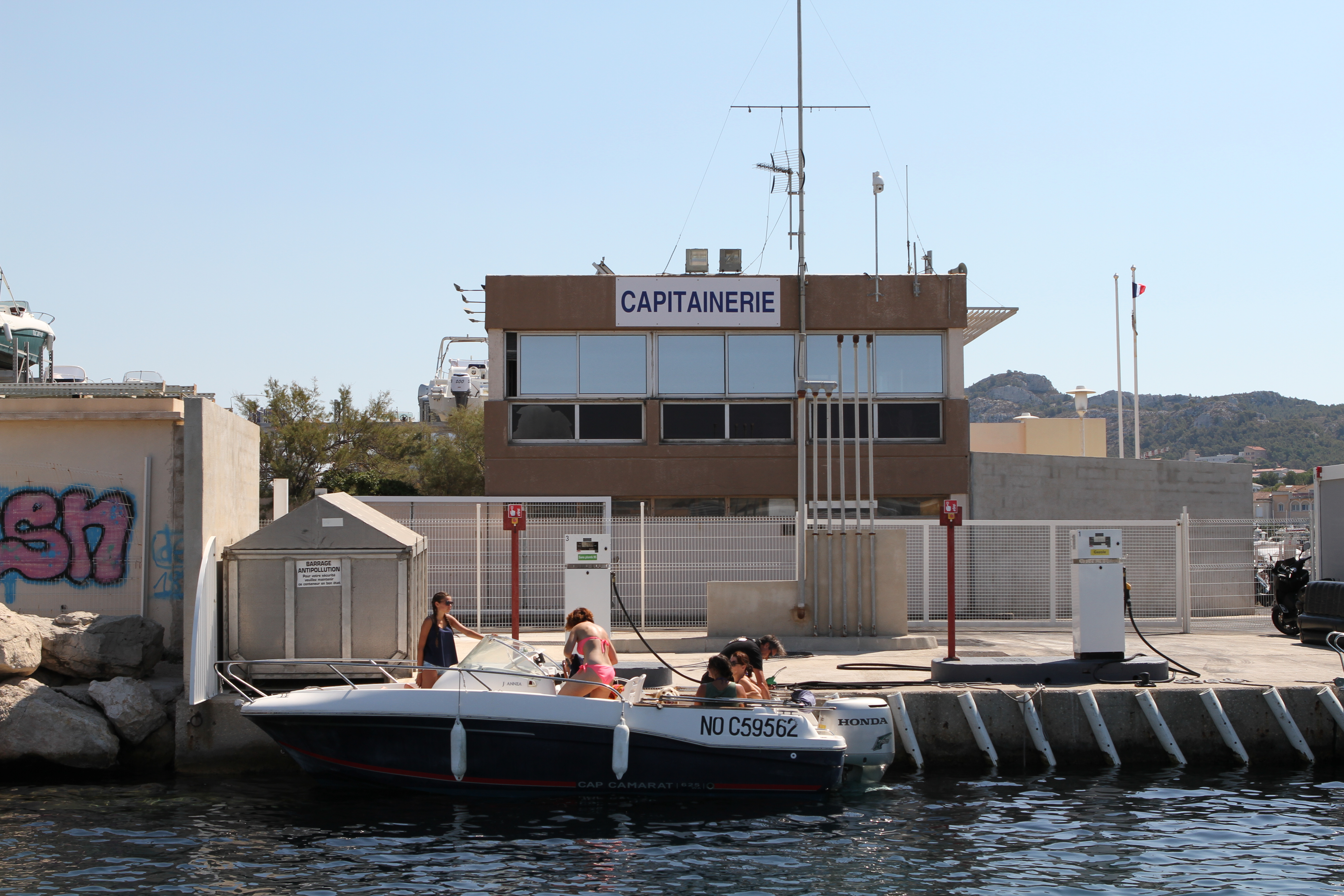 Capitainerie et station service marine de La Pointe-Rouge, Marseille (France)